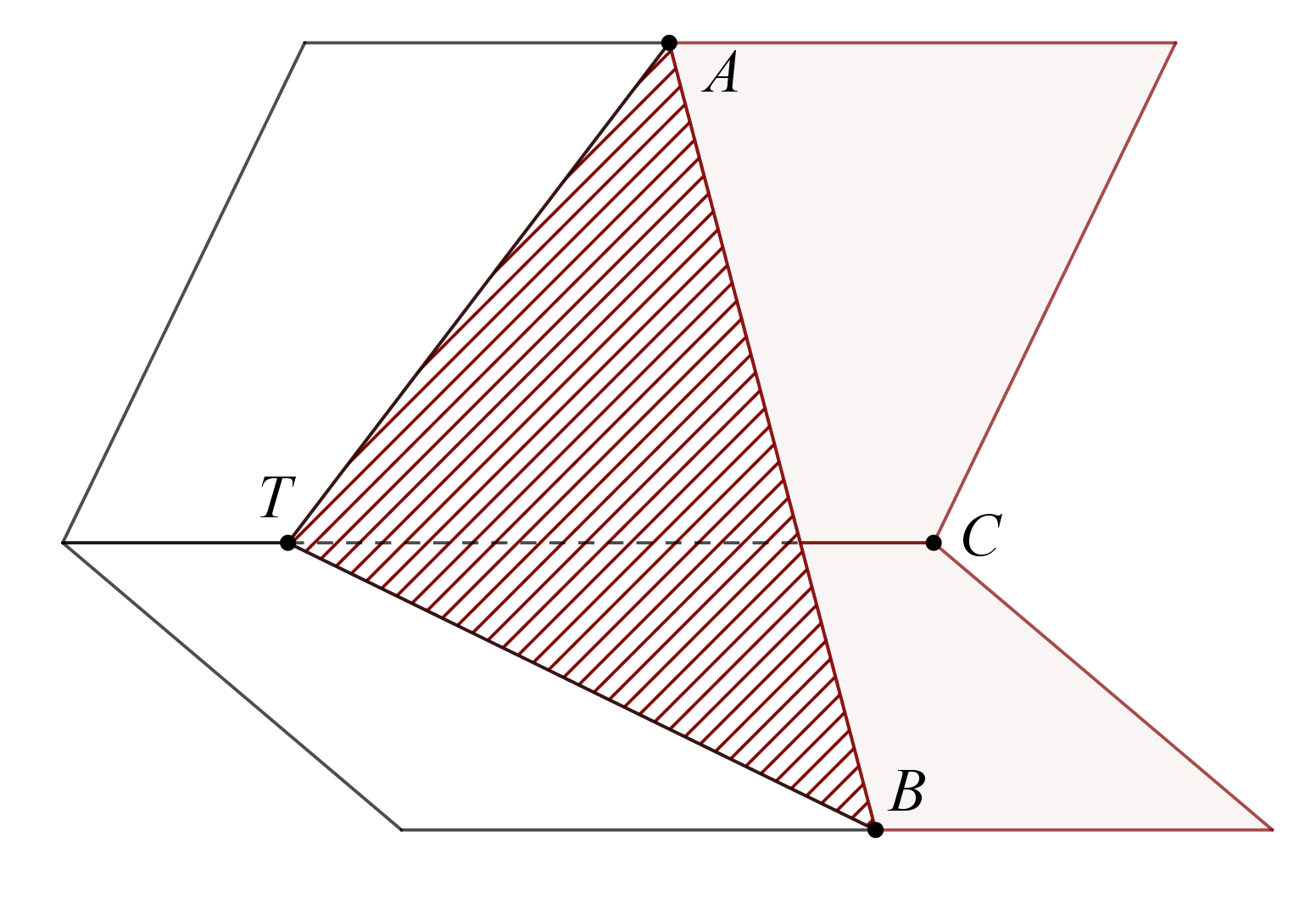 Drievlakshoek als snijdende vlakken